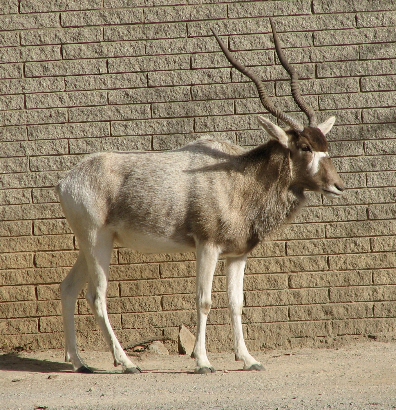 Addax (Addax nasomaculatus)